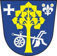 znak obce Huštěnovice